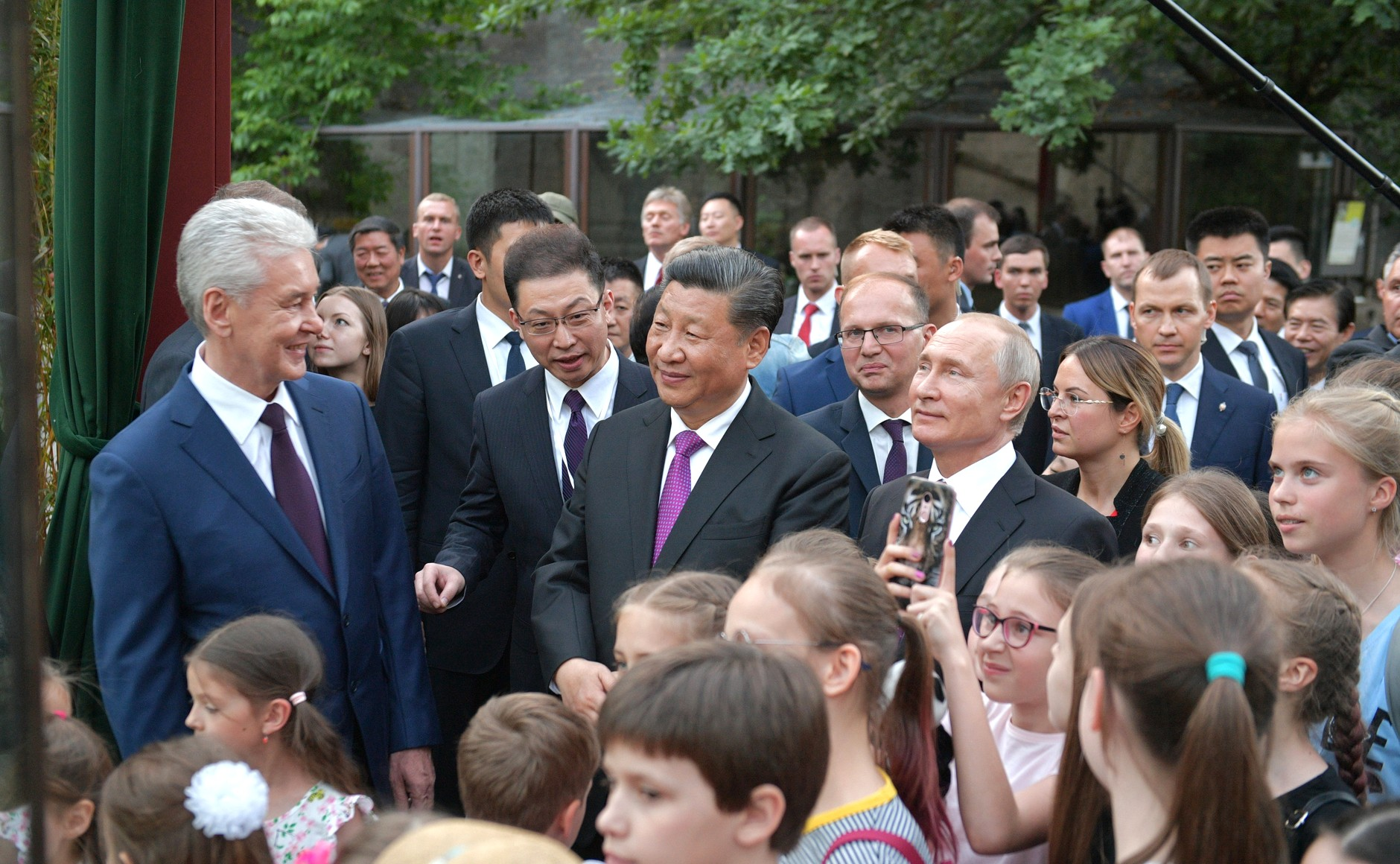 Президент России Владимир Путин с Председателем Китайской Народной Республики Си Цзиньпином и мэром Москвы Сергеем Собяниным (слева) во время посещения Московского зоопарка.